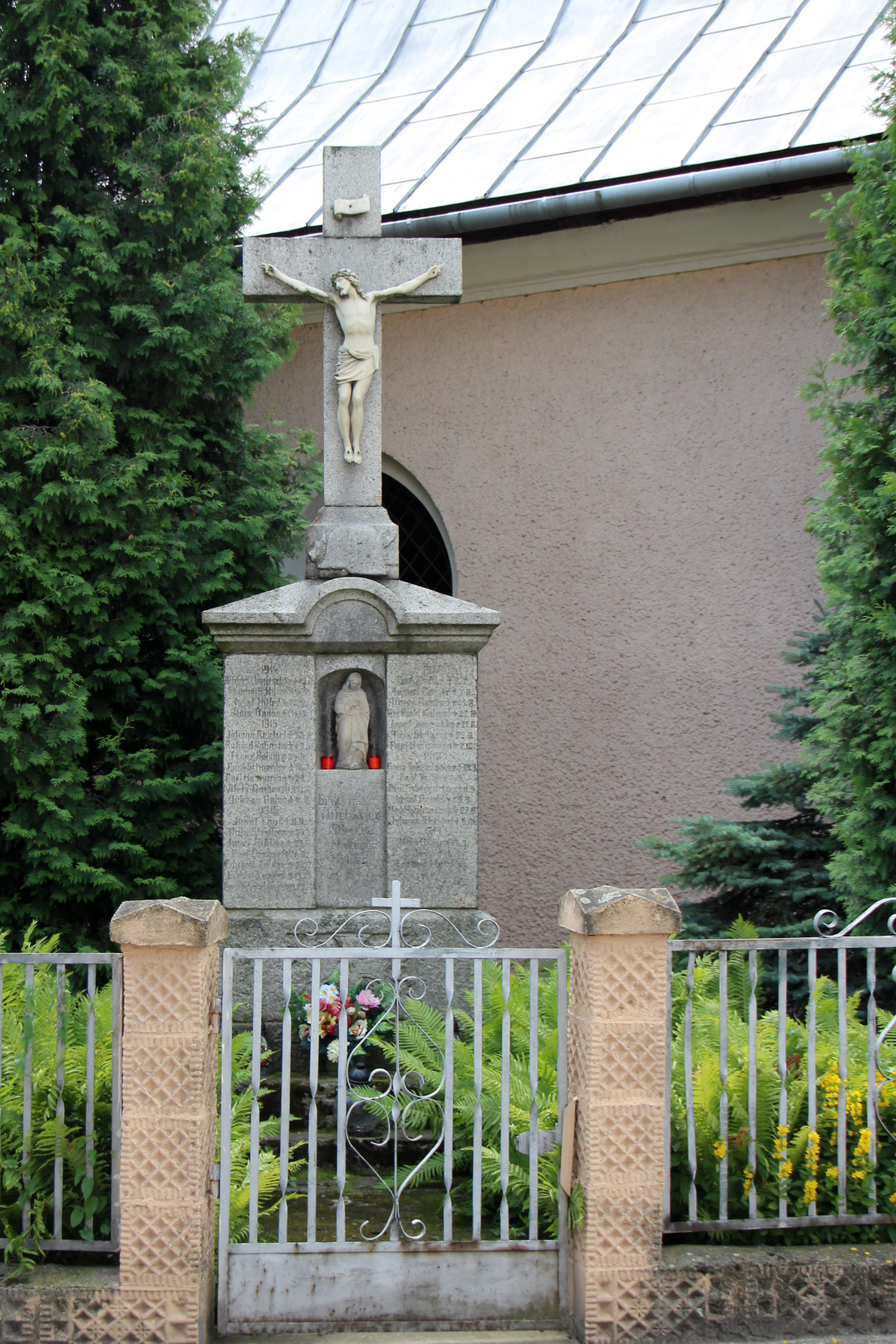 Jasiona - rzymskokatolicki kościół filialny pw. NMP, 1900, 1986